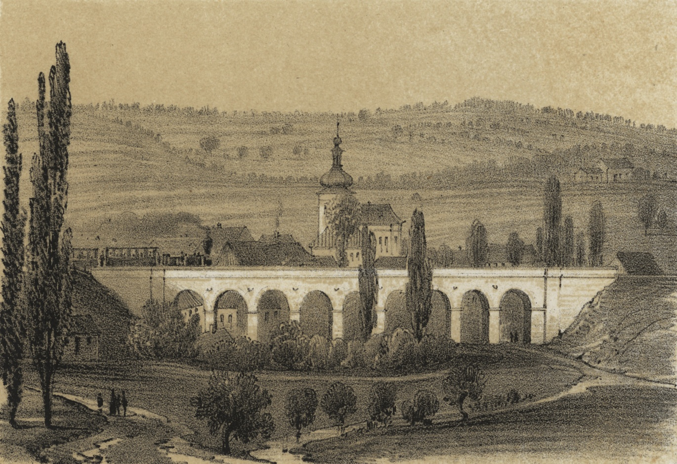 Úvaly